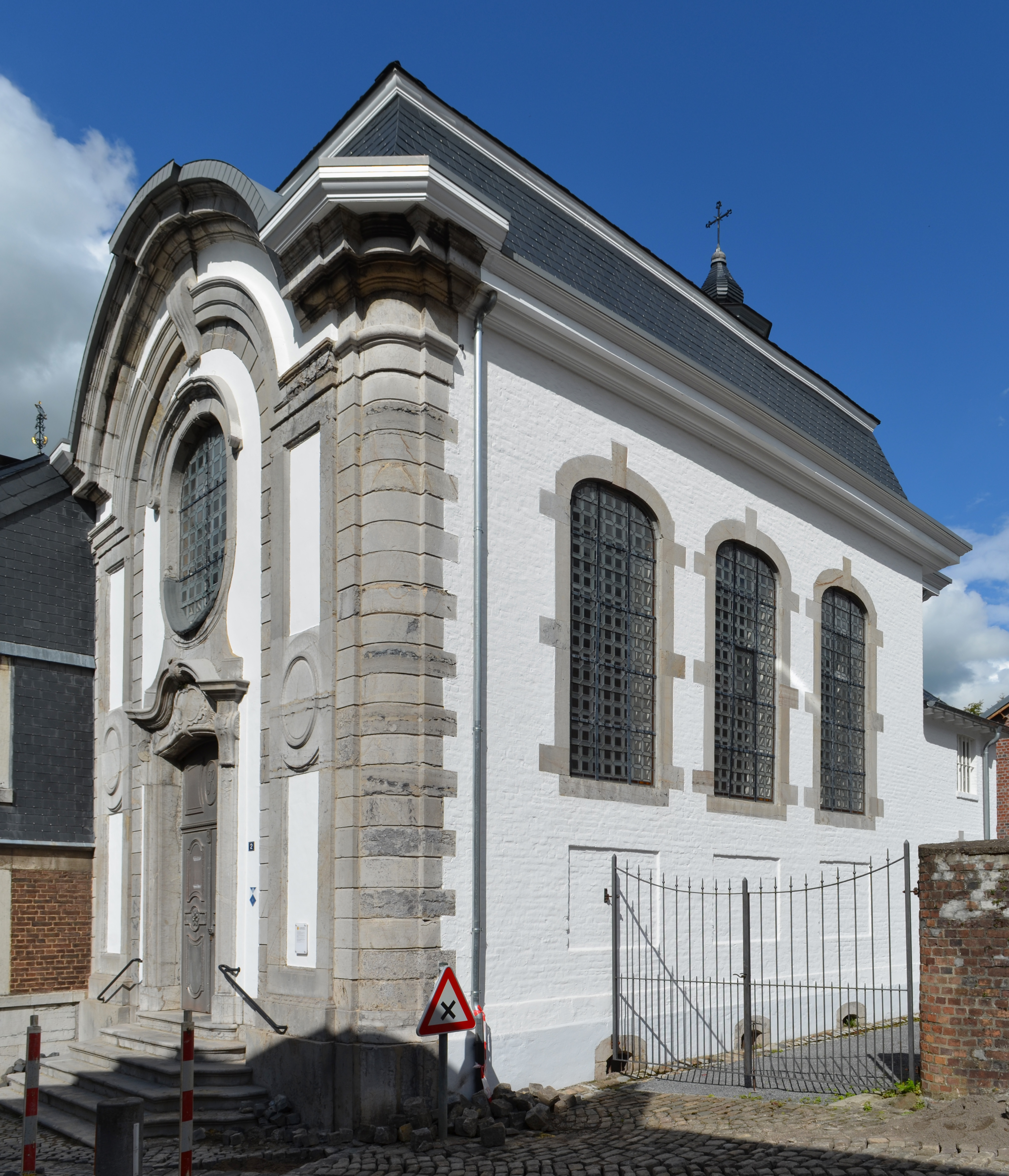 Sankt Johannes-Baptist Enthauptungskapelle in Nispert